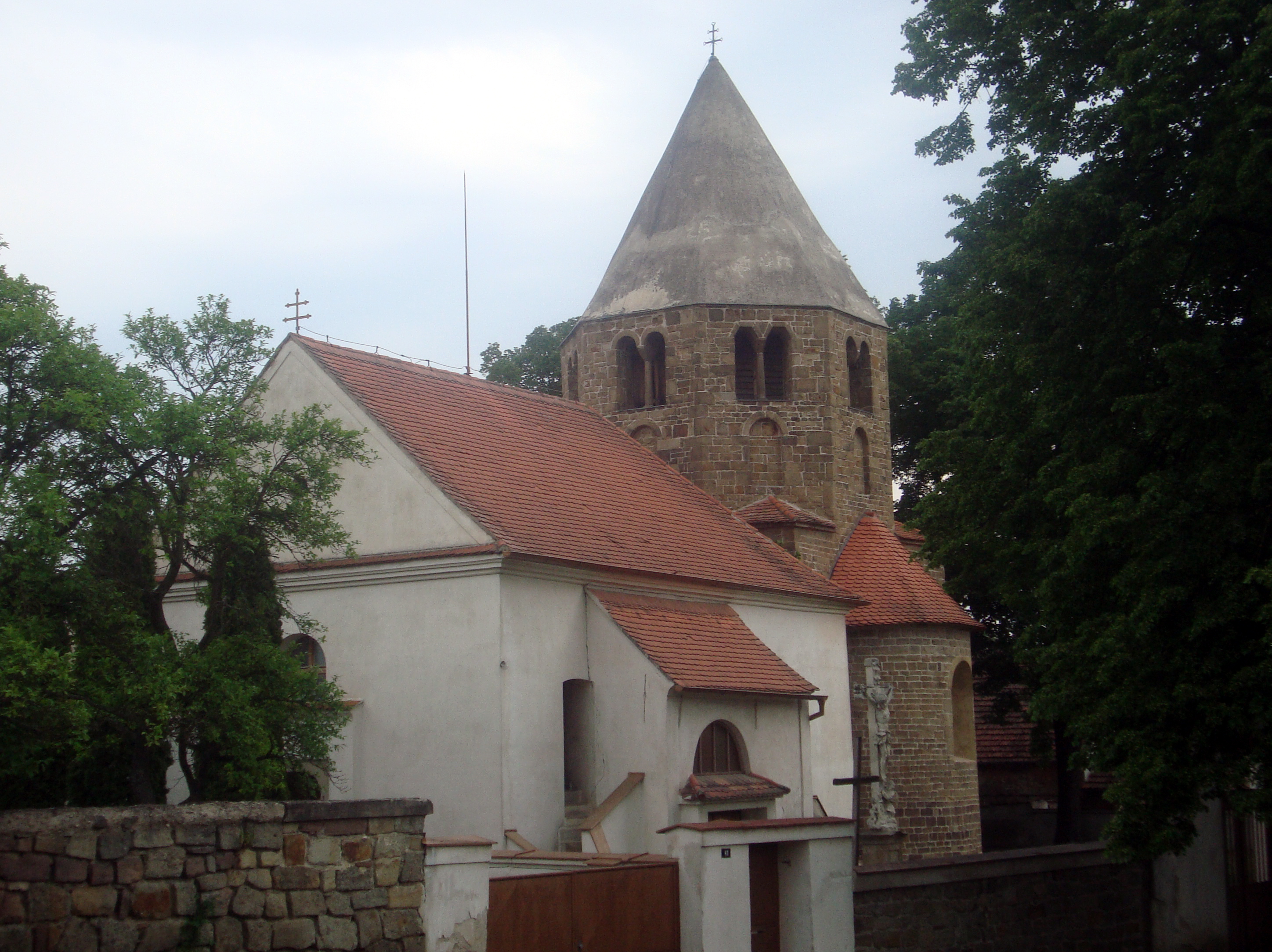 Řeznovice románský chrám sv. Petra a Pavla